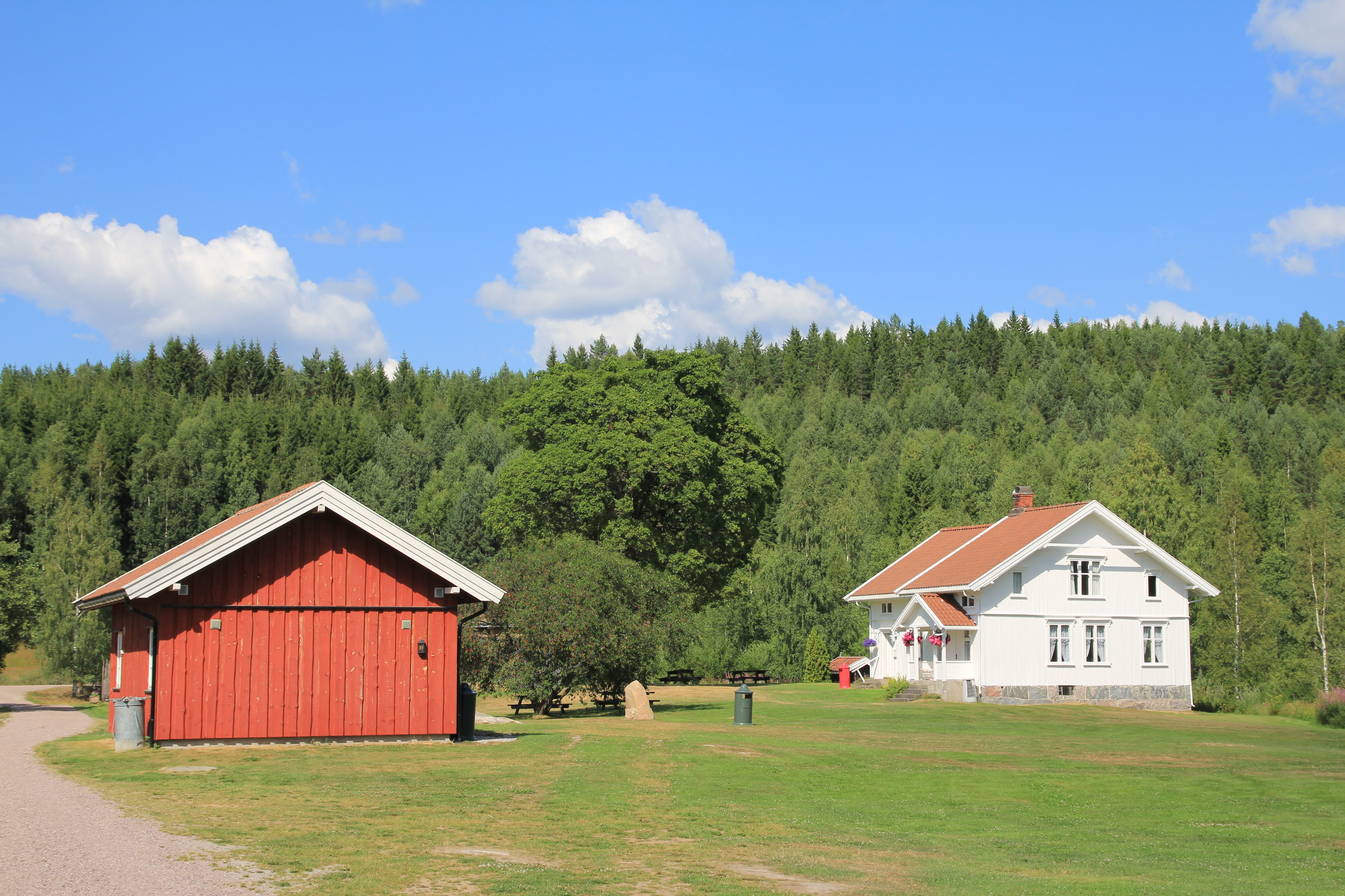 Kurøen er en gård i tidligere Rømskog kommune som idag er et kombinert bygdetun og kultursenter.